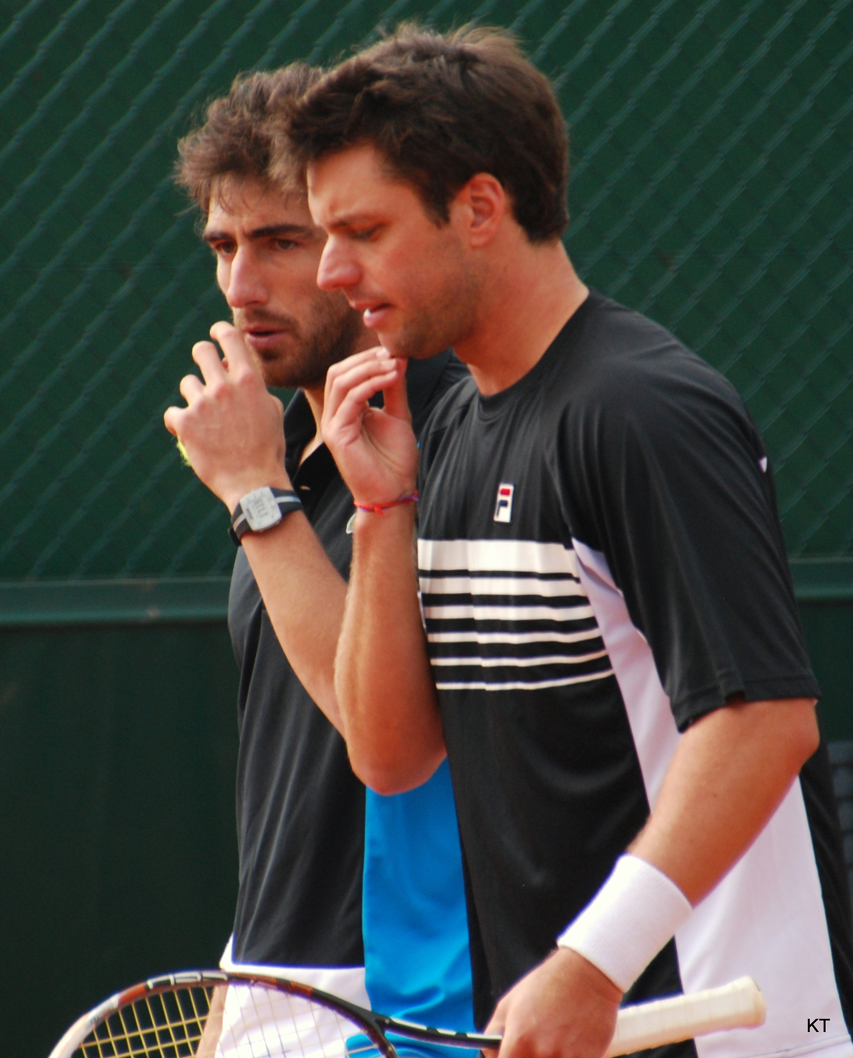 Pablo Cuevas & Horacio Zeballos